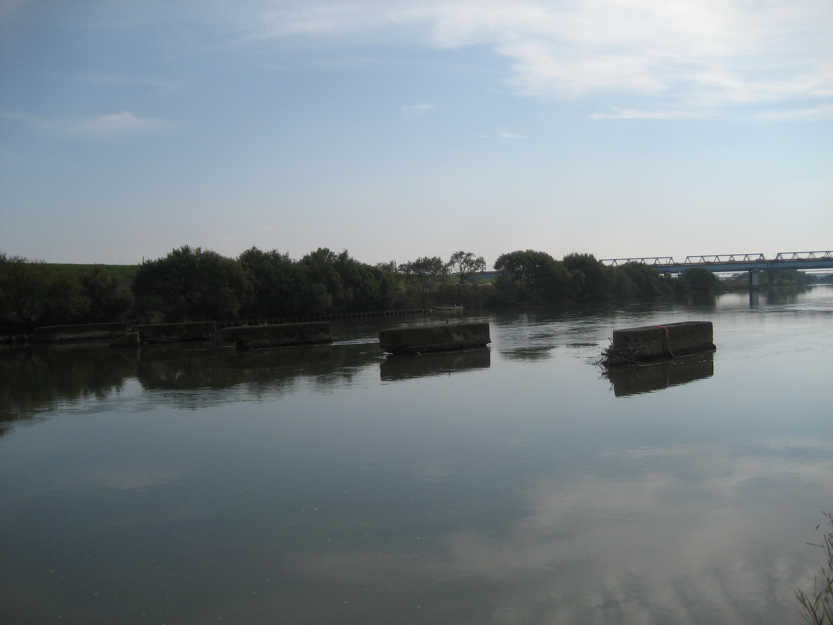 旧流山橋跡（橋台と現橋を撮影）